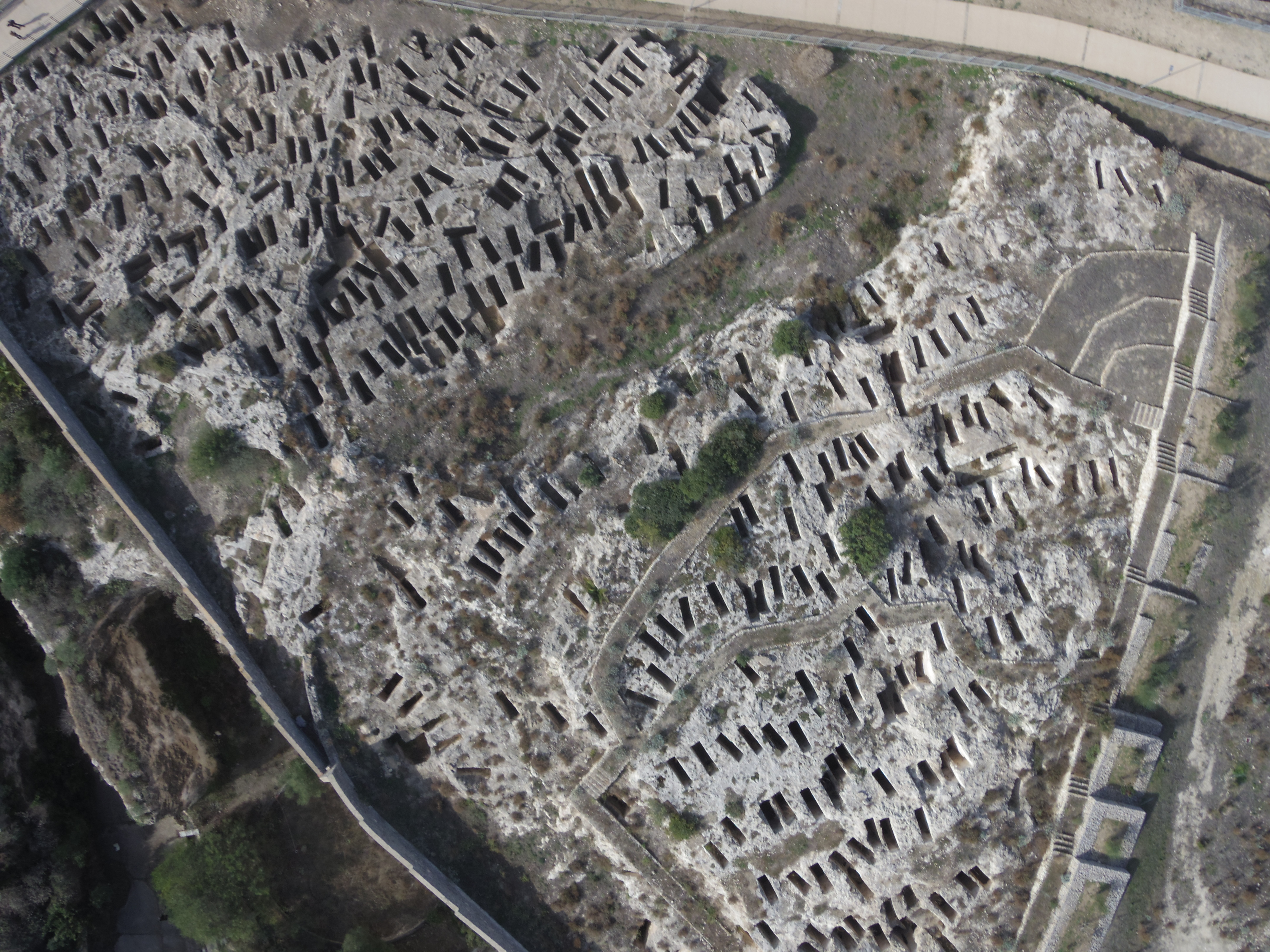 Necropoli di Tuvixeddu This is a photo of a monument which is part of cultural heritage of Italy.